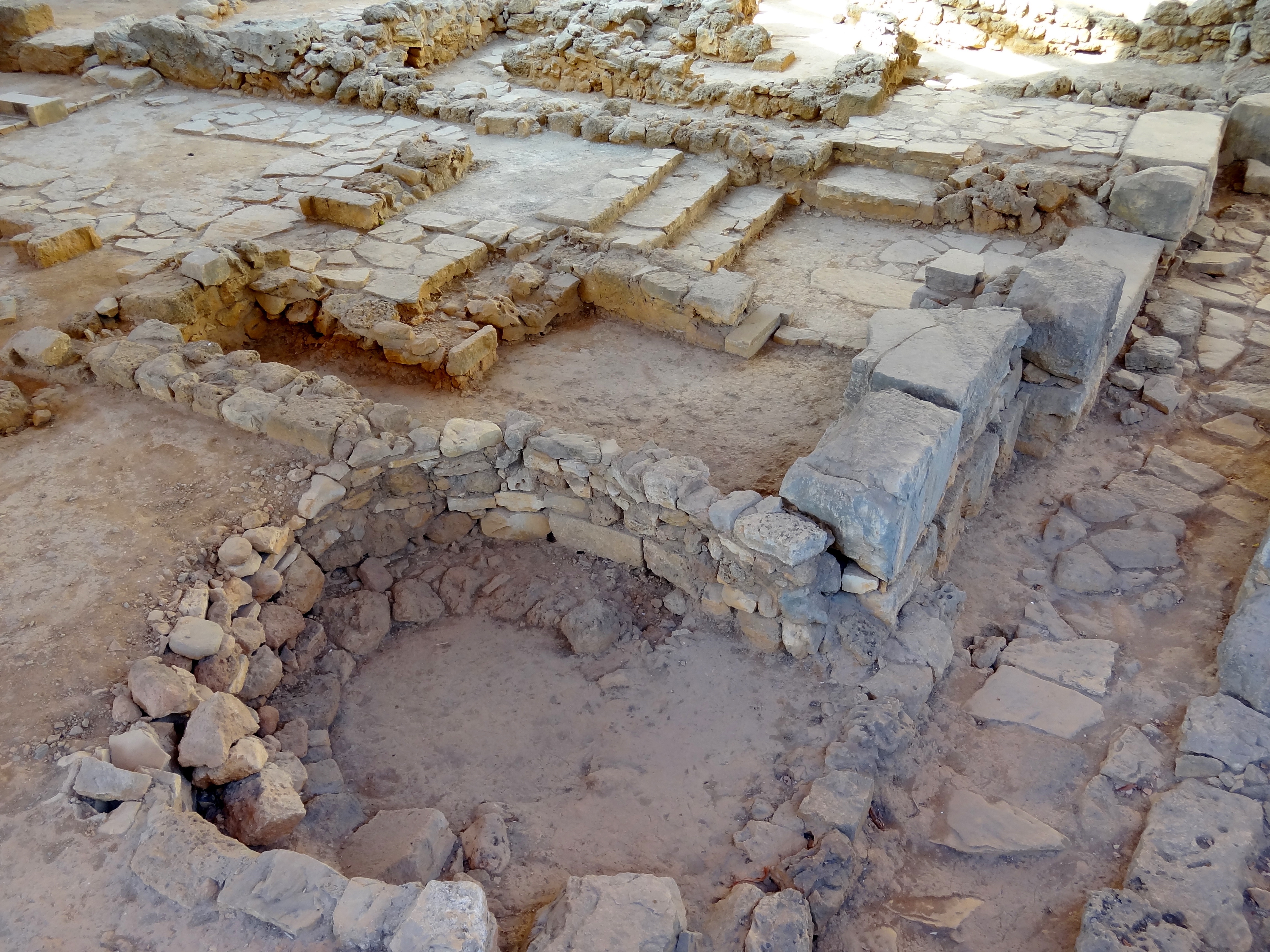 Minoische Ausgrabungen auf dem Kastelli-Hügel in Chania, Gemeinde Chania, Regionalbezirk Chania, Kreta, Griechenland